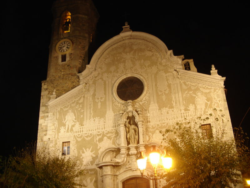 Església de Sant Martí de Sant Celoni autor=ZztopzZ